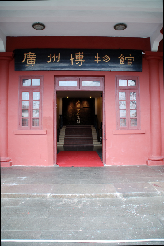 廣州博物館